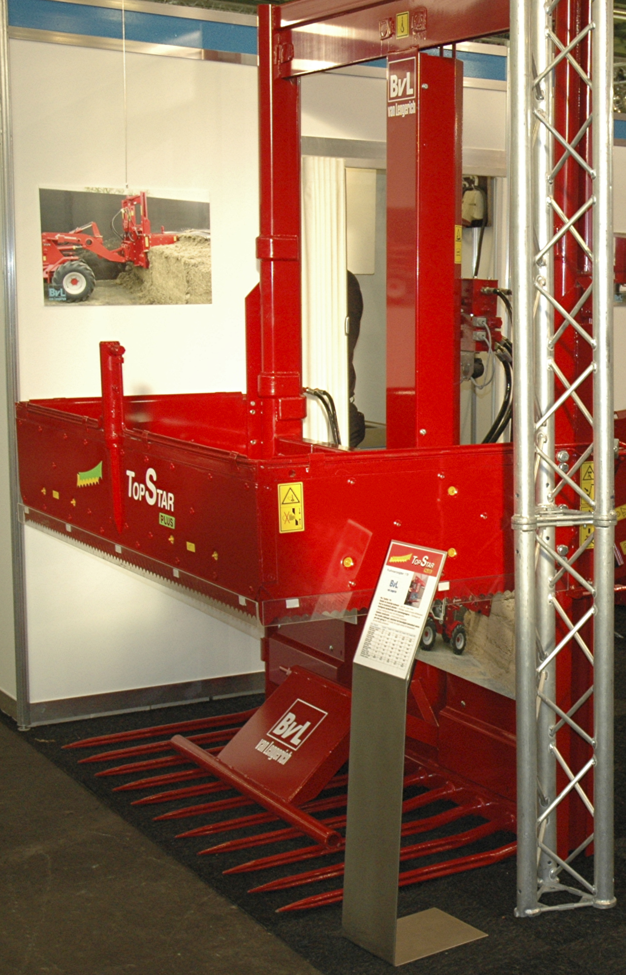 Siloblockschneider TopStar Plus von BvL (Maschinenfabrik Bernard van Lengerich, Emsbüren); Agriflanders 2005.